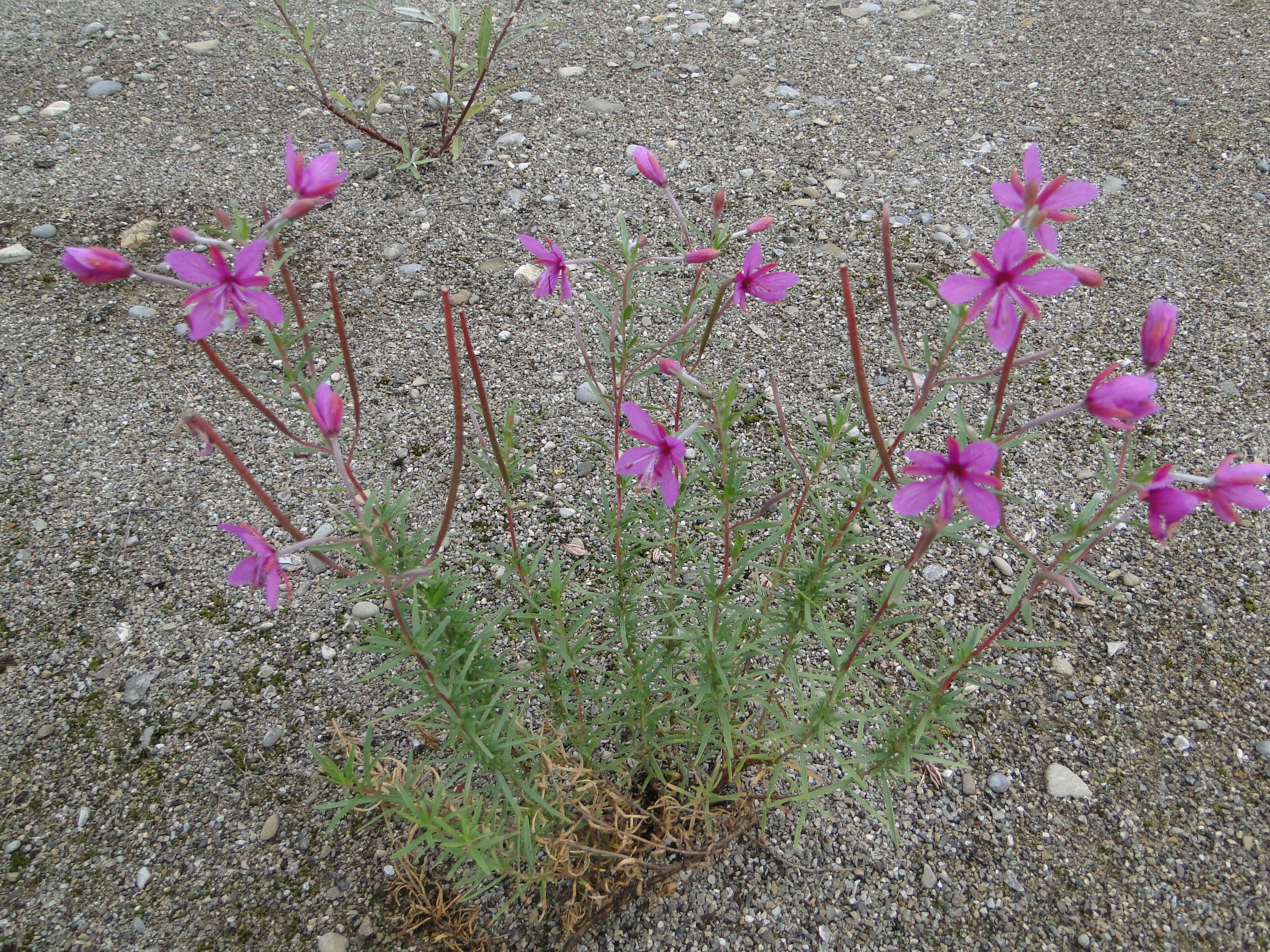 Rosmarin-Weidenröschen im NSG Kiesgrube Aitrach